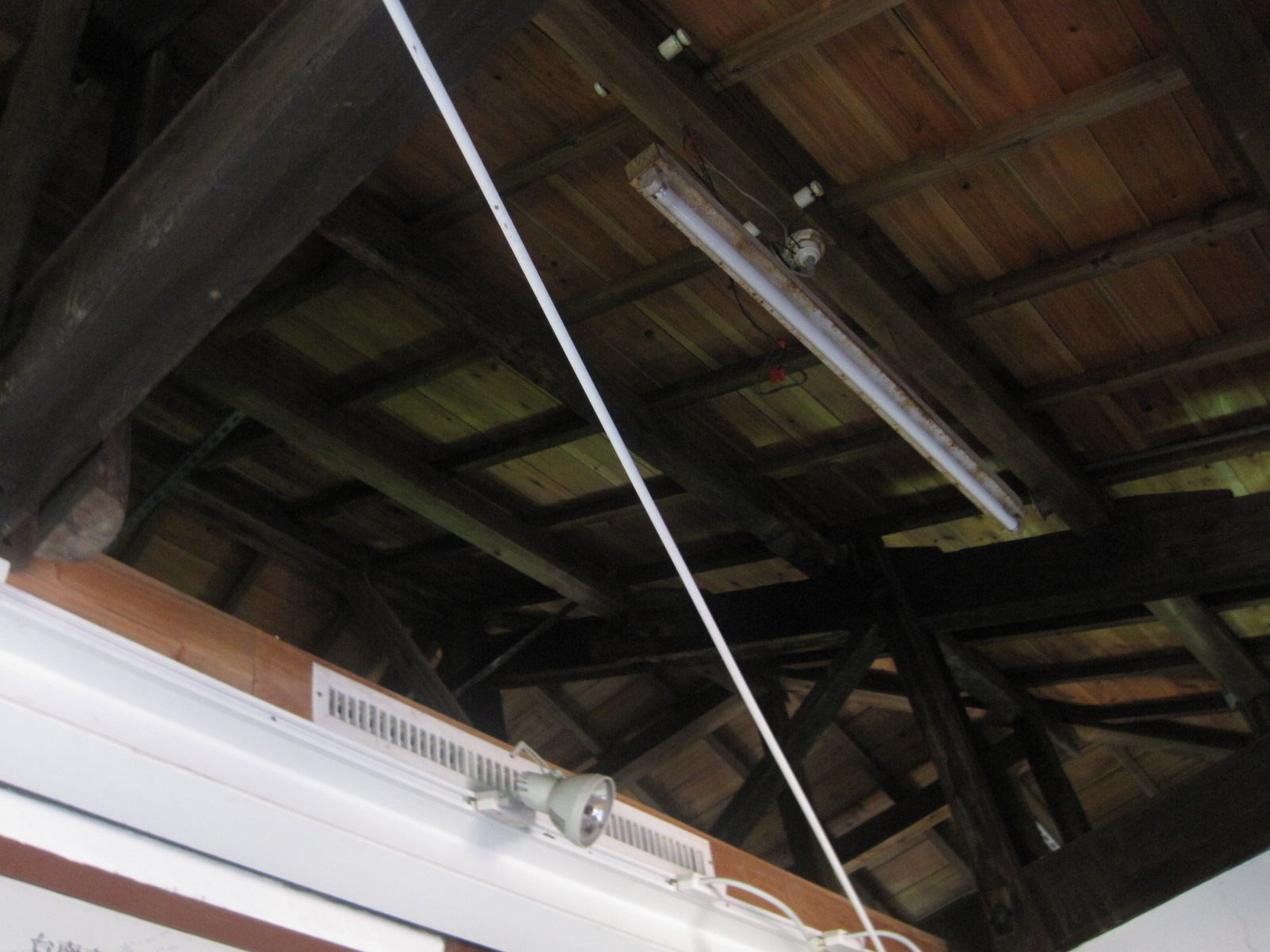 臺南運河博物館屋頂內部。